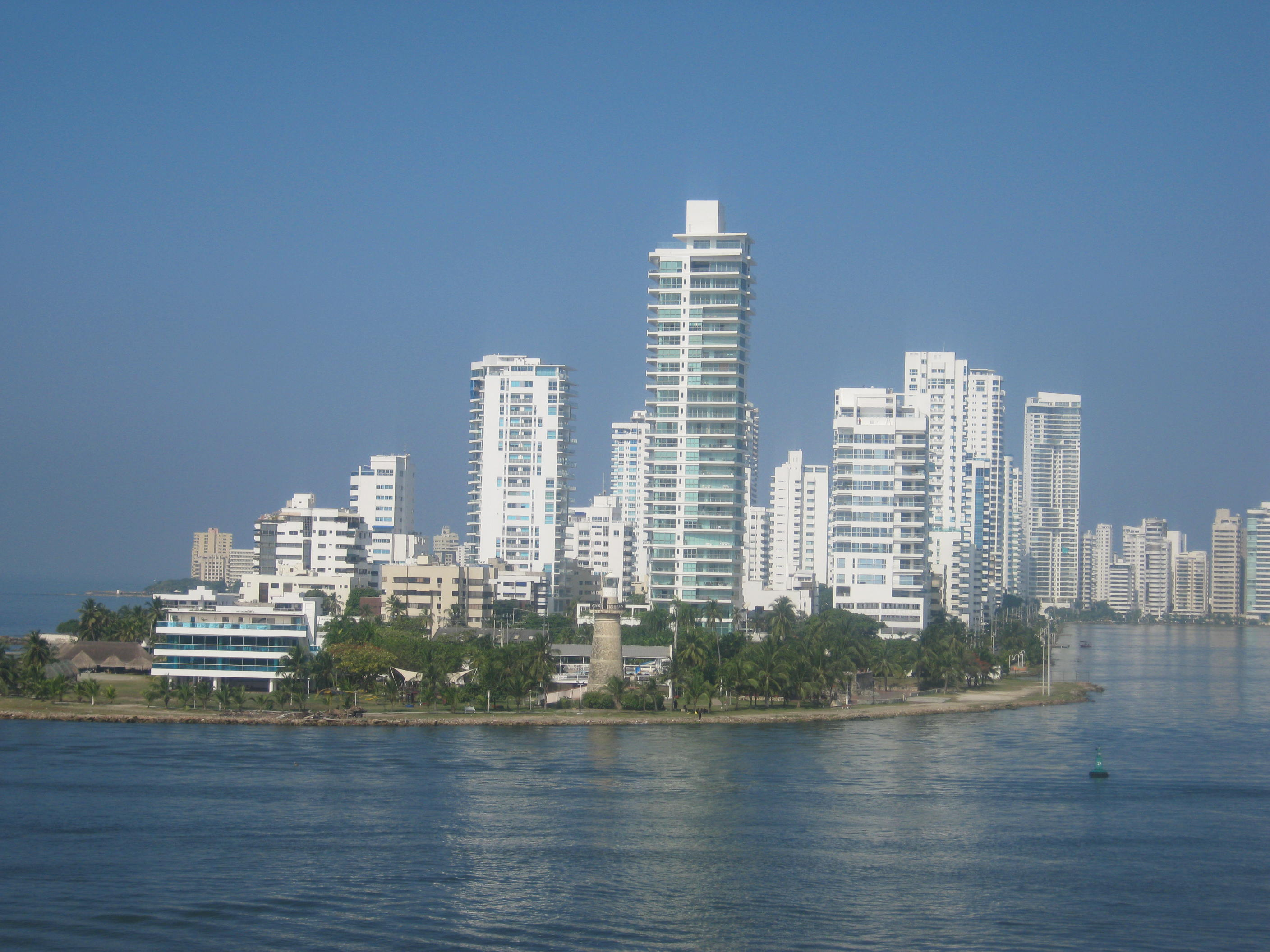 Cartagena, Colombia